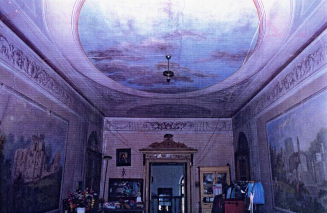 Interni di Villa Dora